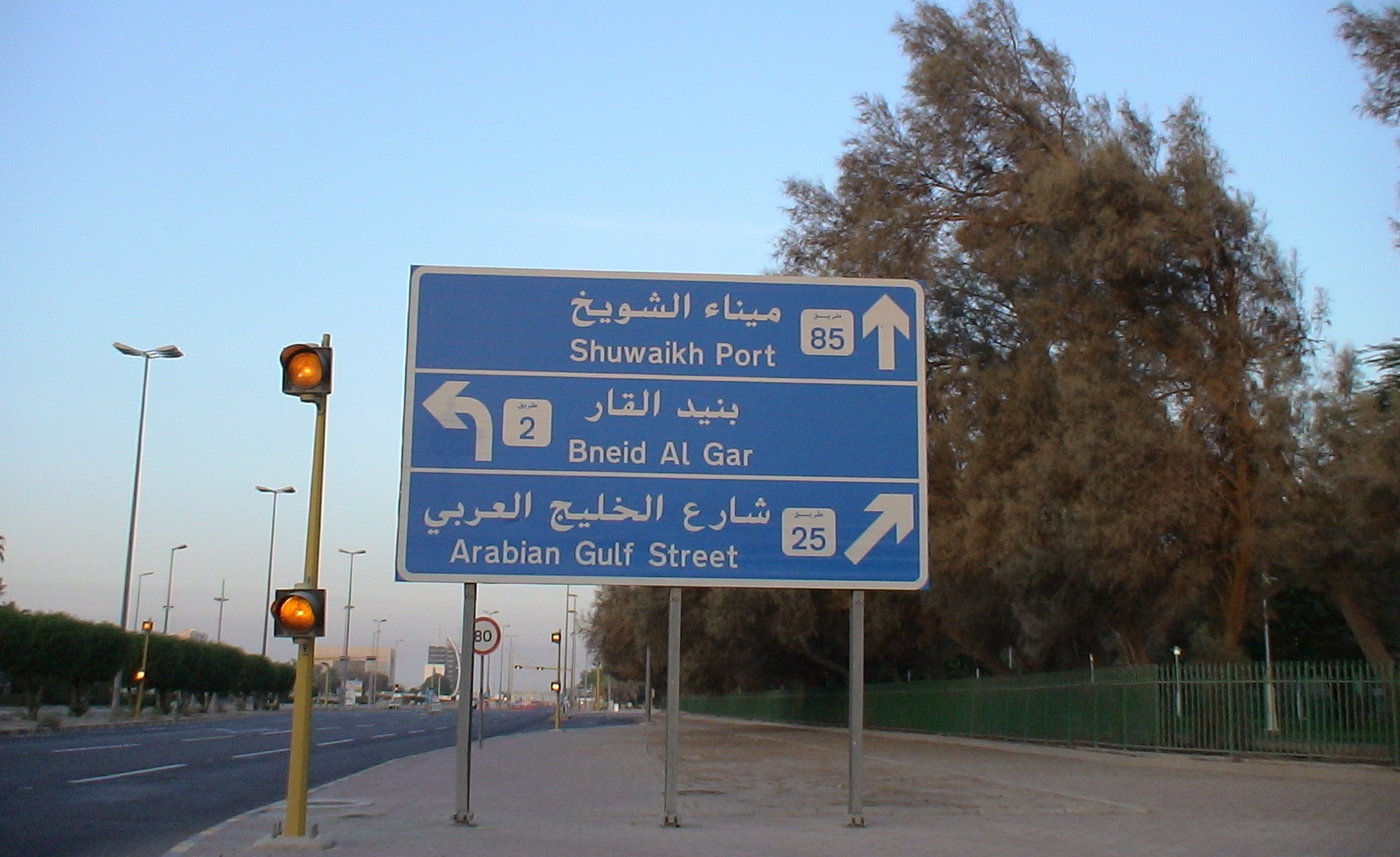 an Banner in kuwait city